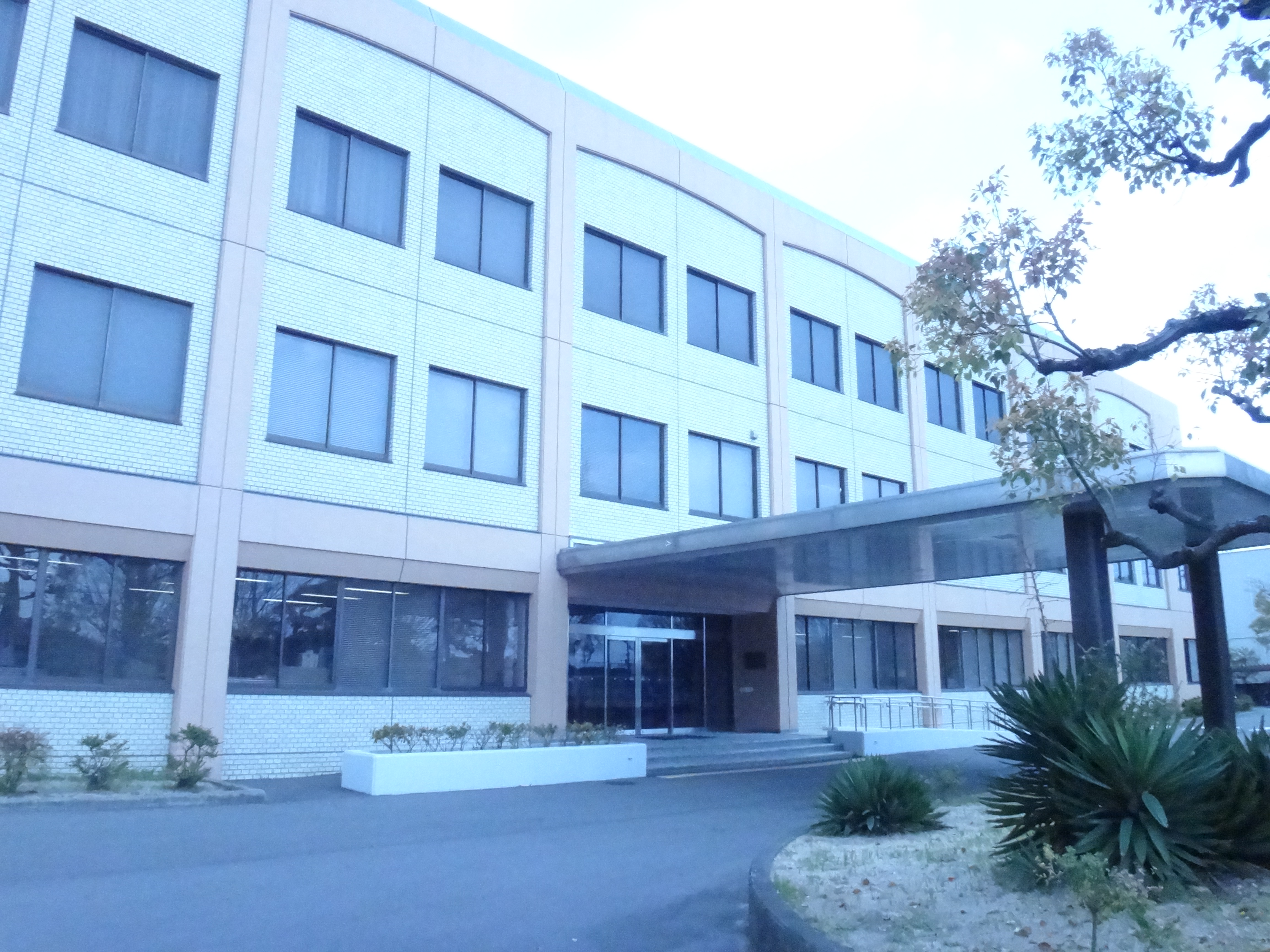 山口地方裁判所岩国支部・山口家庭裁判所岩国支部・岩国簡易裁判所・岩国検察審査会が入居するビル外観